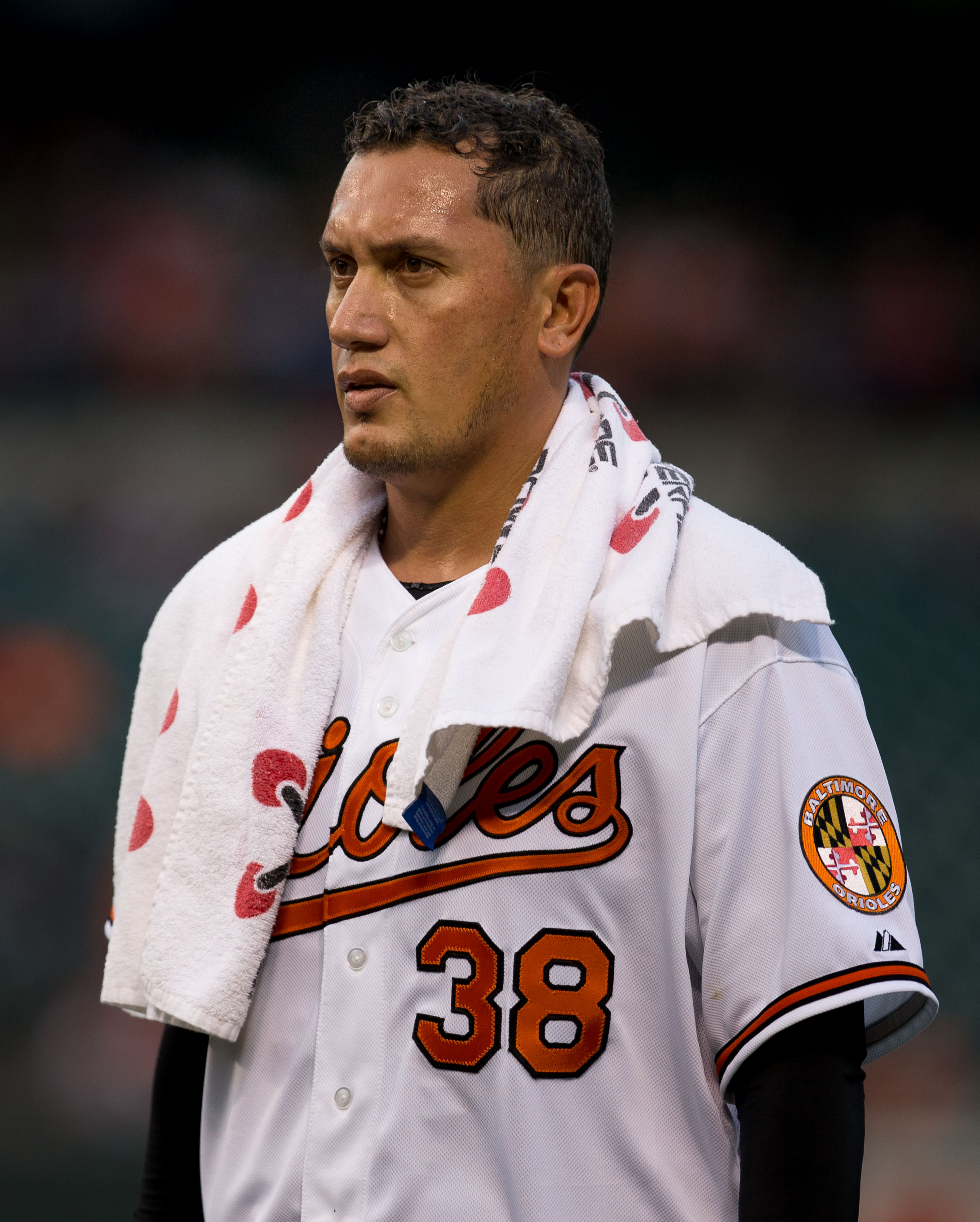 Freddy García